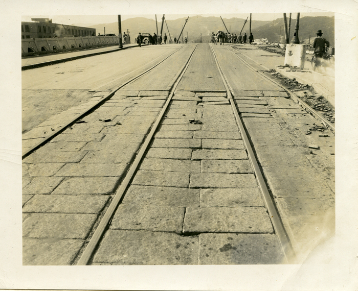 被爆後の相生橋停留所、現在の原爆ドーム前停留場から西方向を望む。左上は本川小学校。